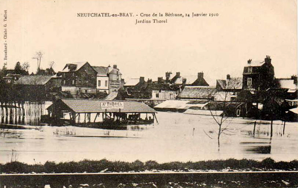 Crue de la Béthune à Neufchâtel-en-Bray, en janvier 1910